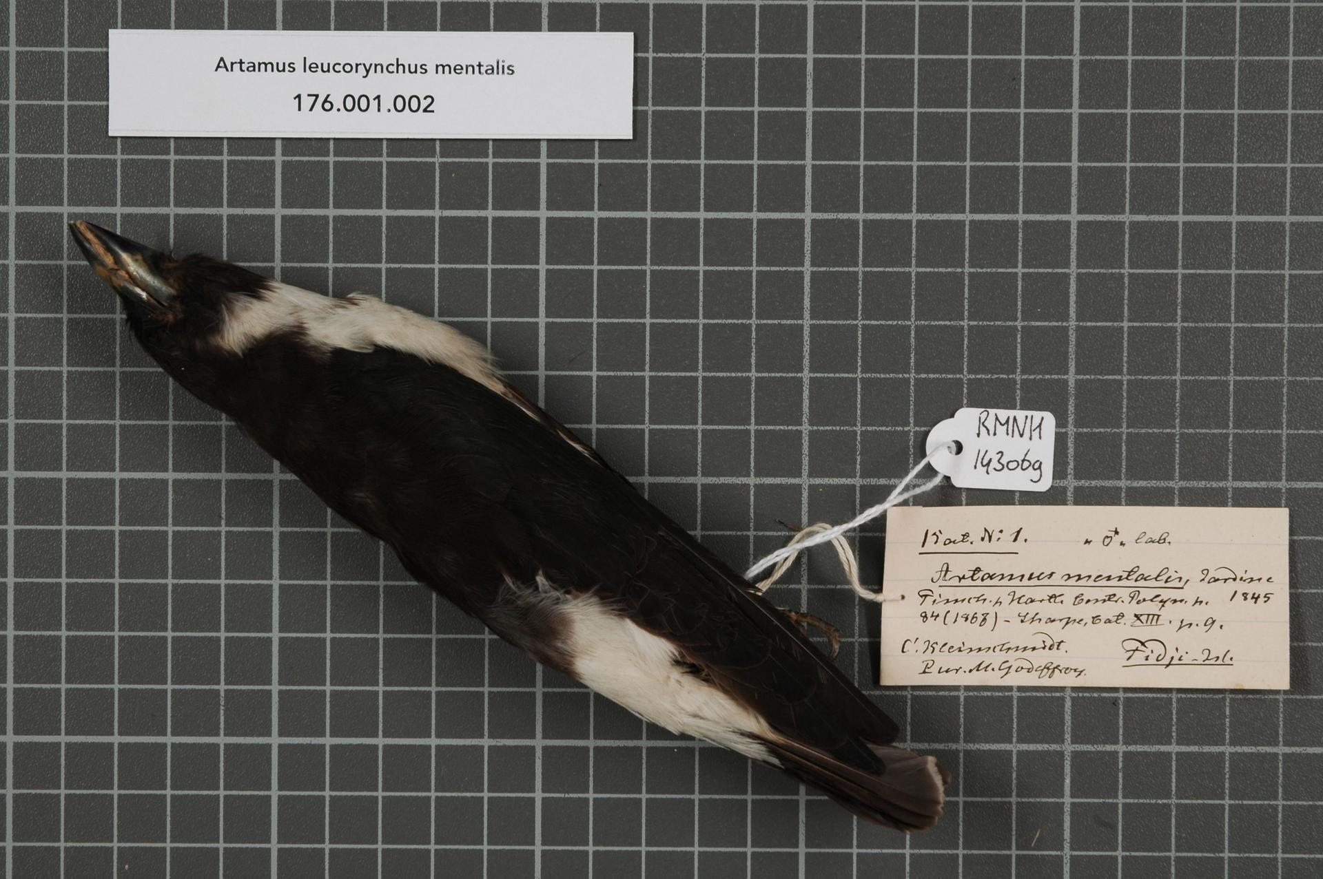 Artamus leucorhynchus mentalis Jardine, 1845